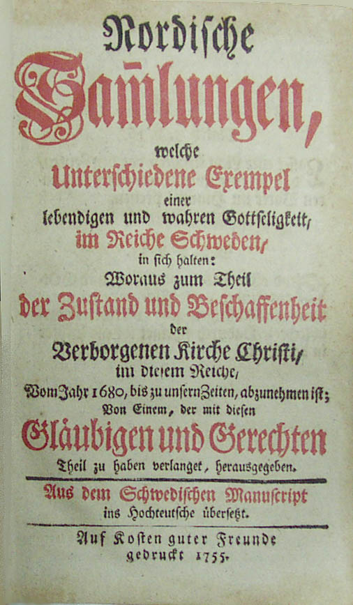 Titelblad från pietisthistoriken Nordische Sammlungen